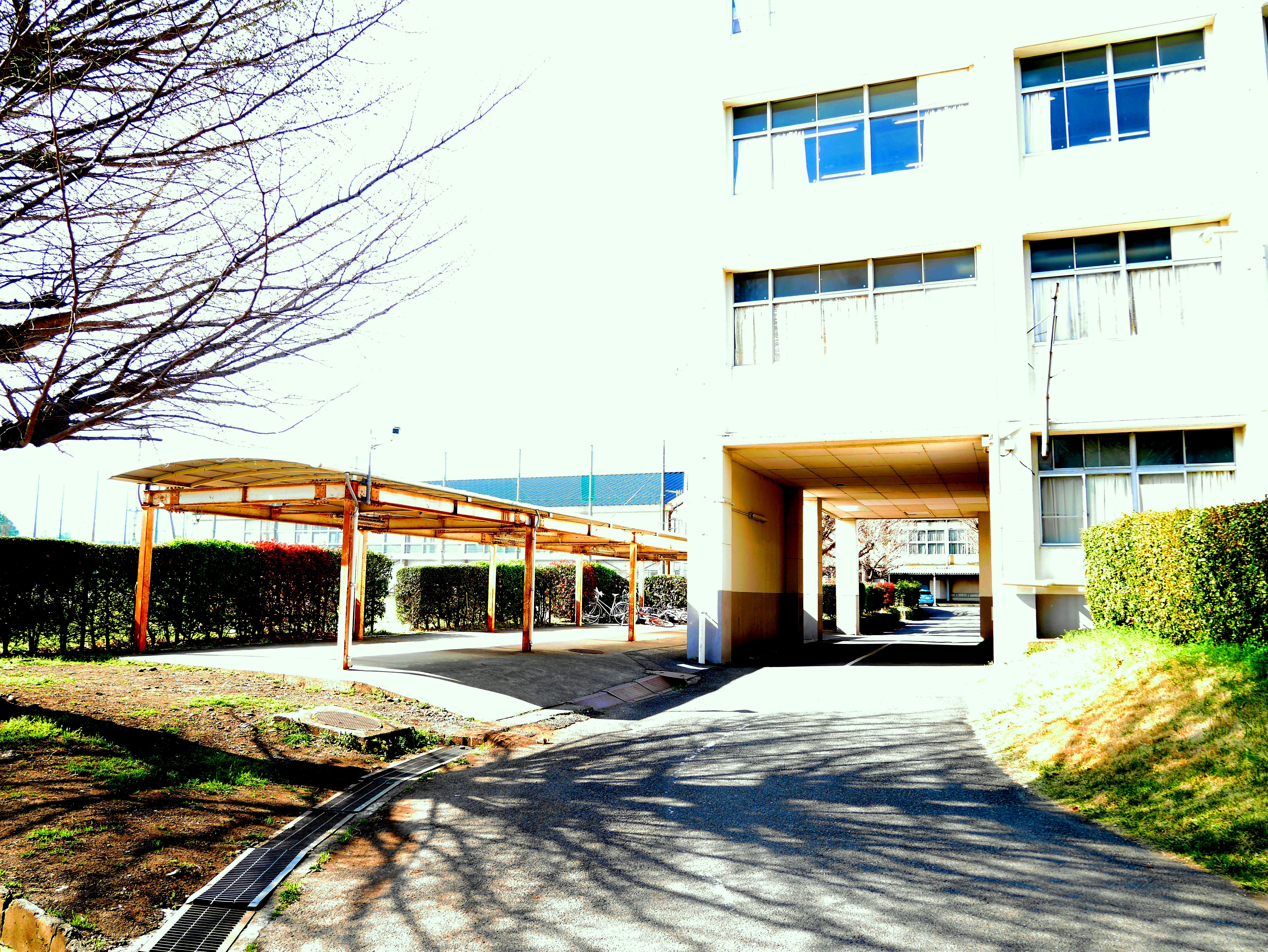 神奈川県立厚木高等学校校舎